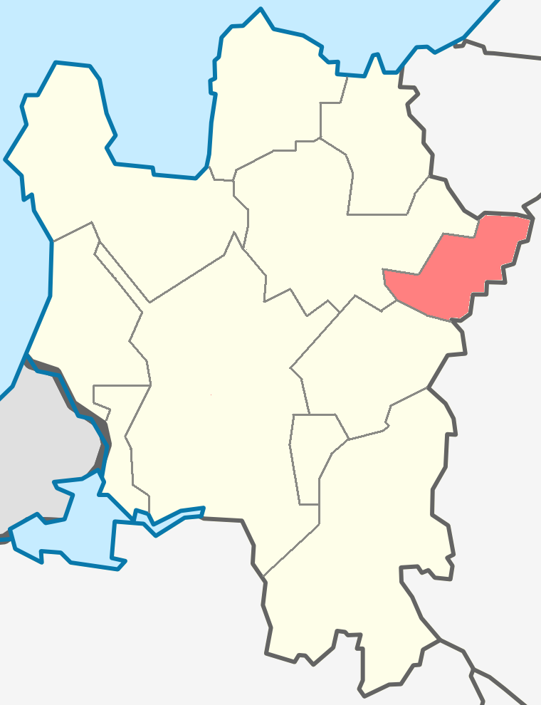 Фалилеевское сельское поселение на карте Кингисеппского района